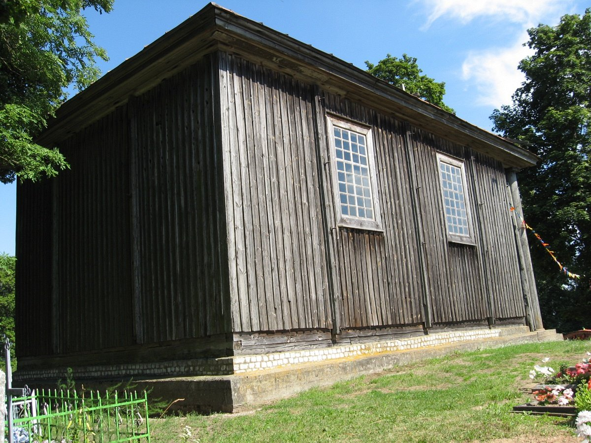 Паляны. Капліца на могілках